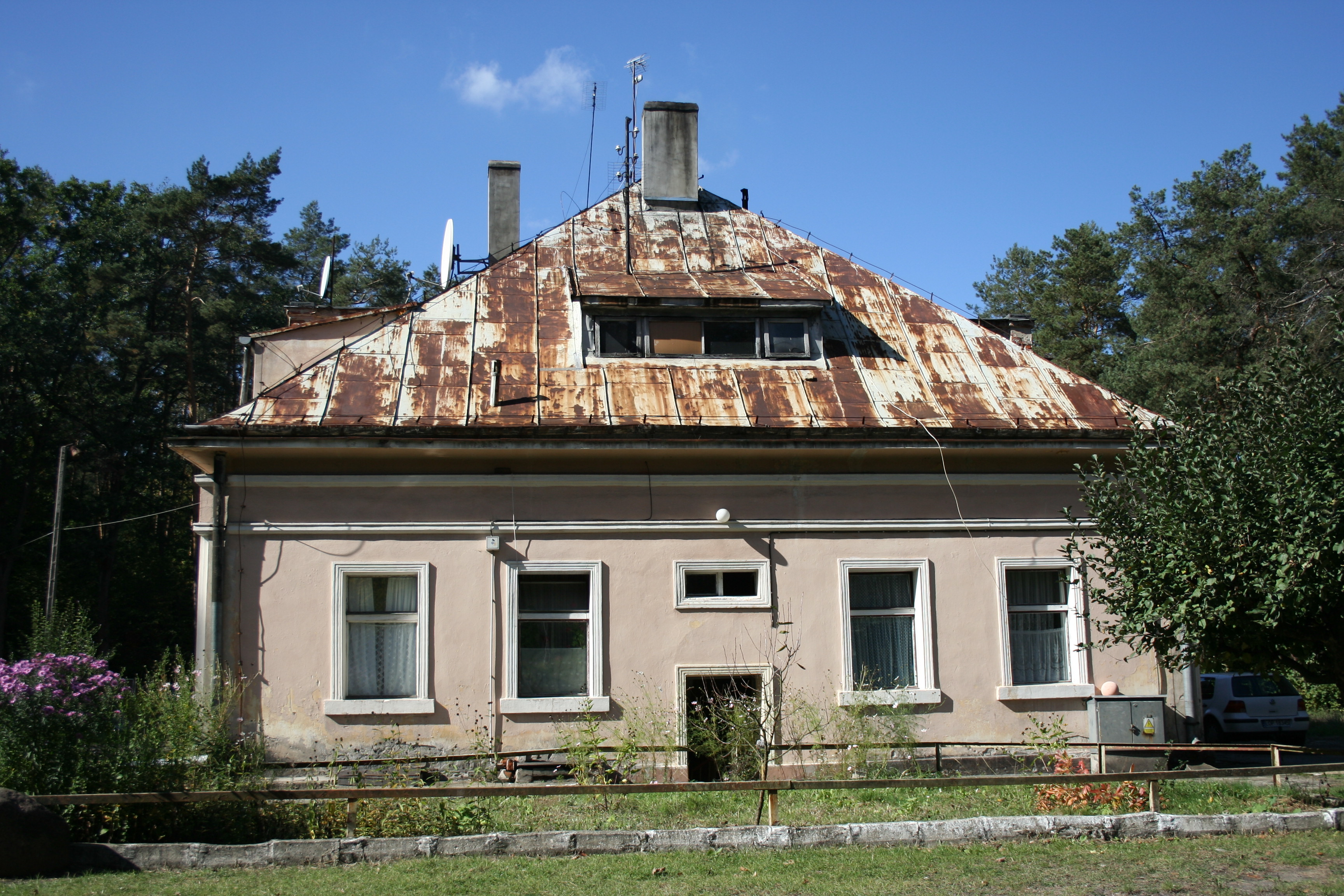 Dworzec kolejowy (1953), ob. dom mieszkalny w zespole Nałęczowskiej Kolei Dojazdowej Poniatowa, ul. Kolejowa 2